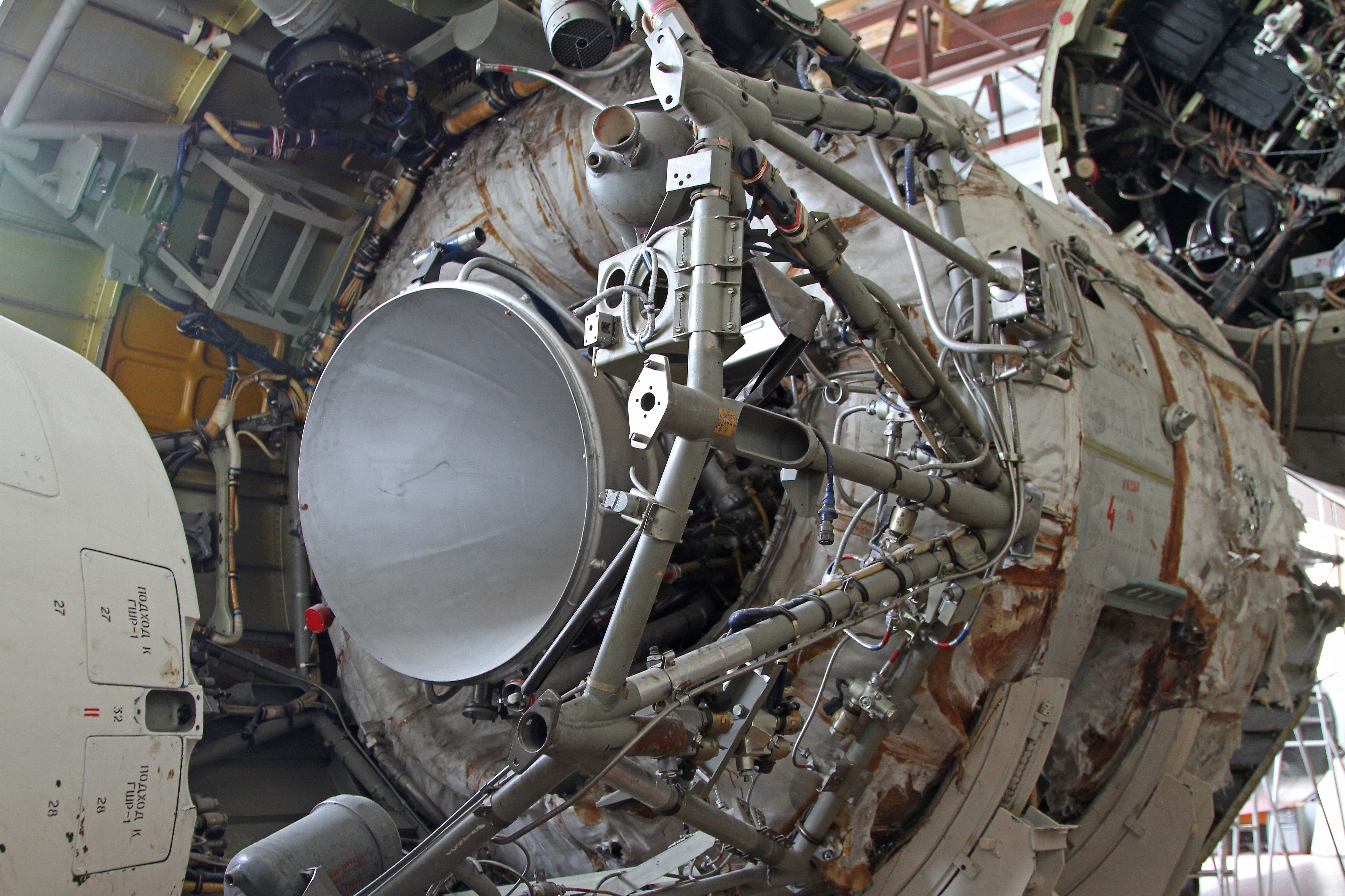 Блок Л РН "Молния"